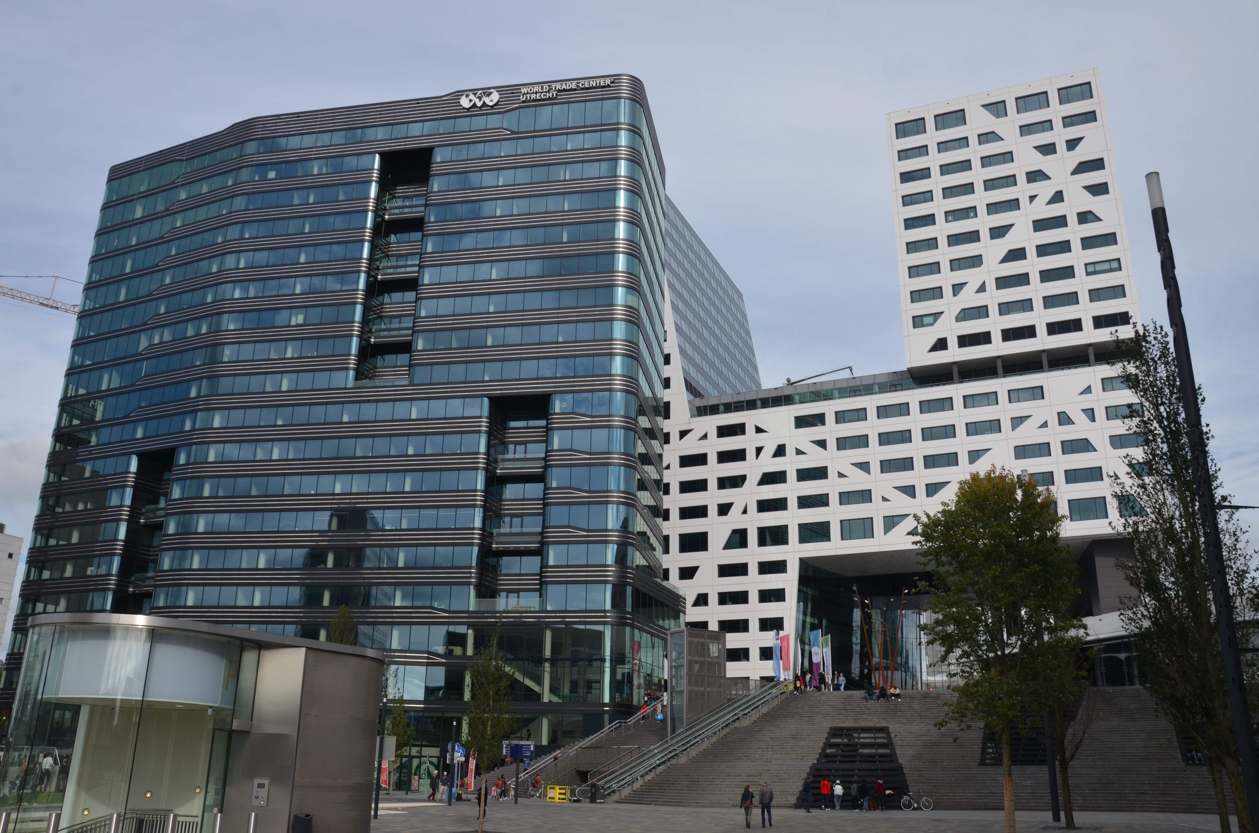 Het World Trade Center en het stadskantoor in Utrecht.